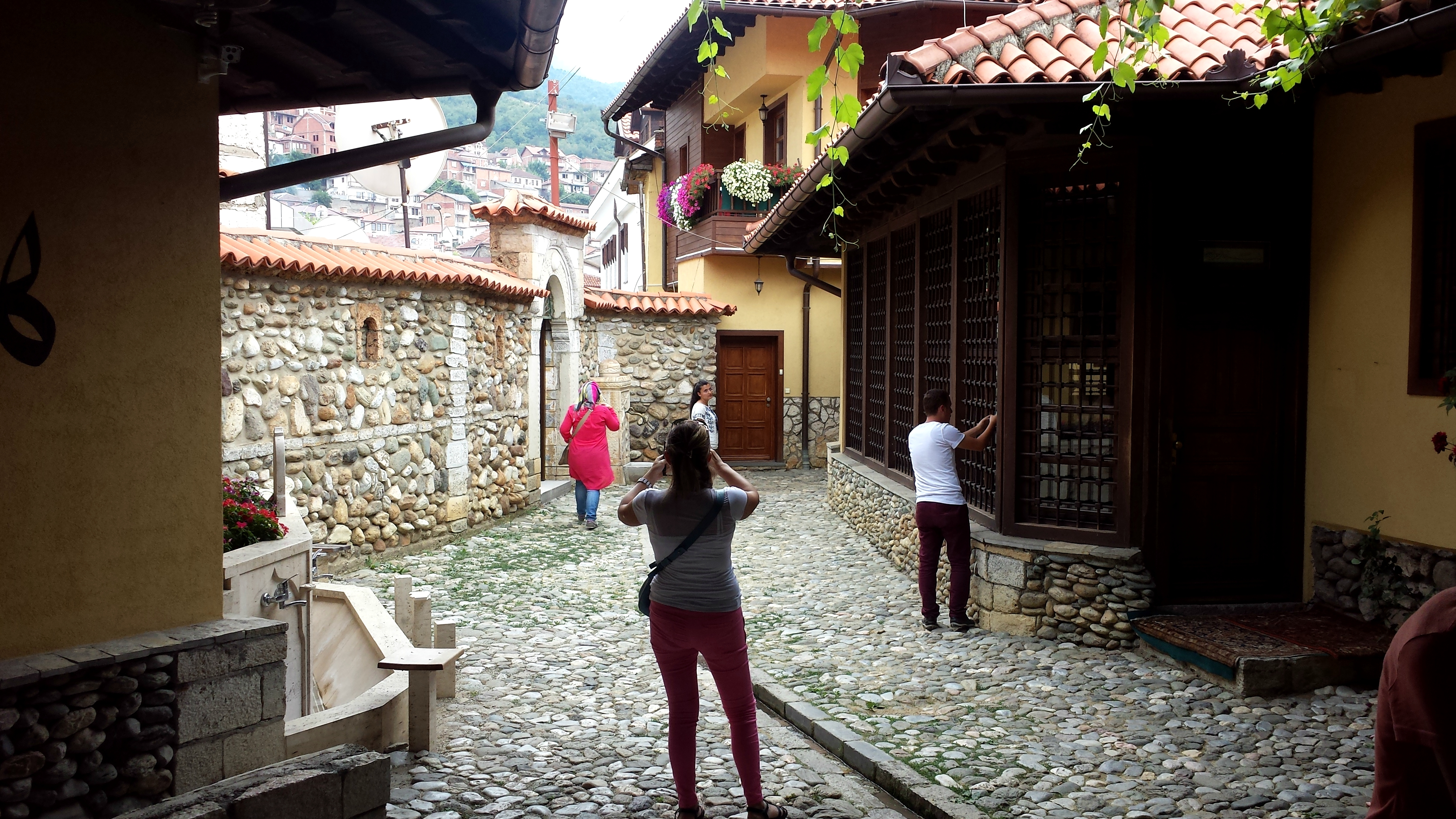 Teqja Halveti